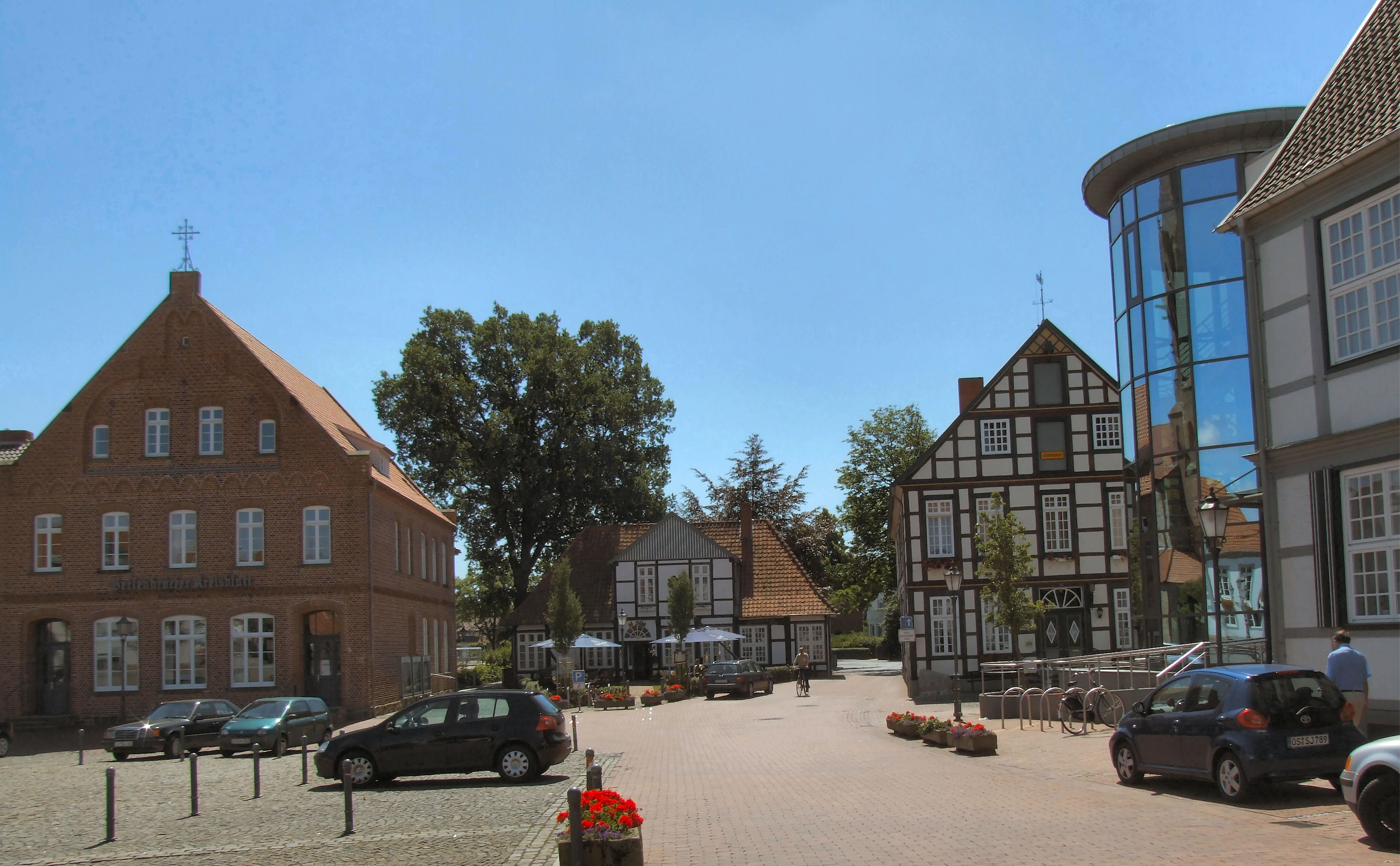 Quakenbrück, Bersenbrücker Kreisblatt links, Museum rechts